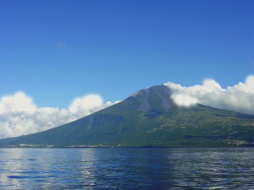 Montanha da ilha do Pico vista do mar, Açores, Portugal